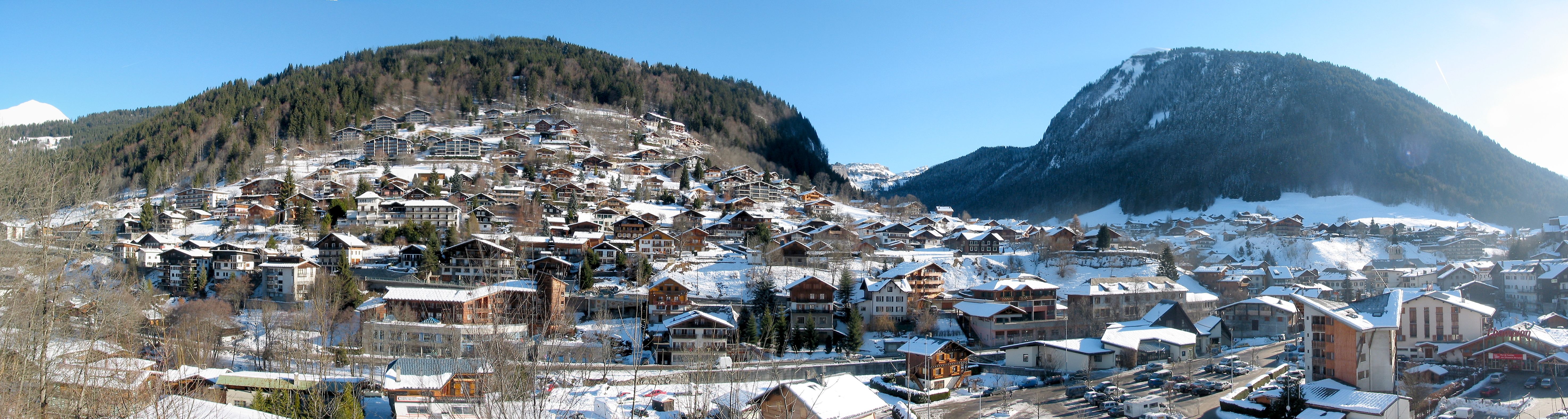 Panorama de la vallée de morzine en Janvier 2006. Source : photographie prise le 08 Janvier 2006 par l'utilisateur Snip